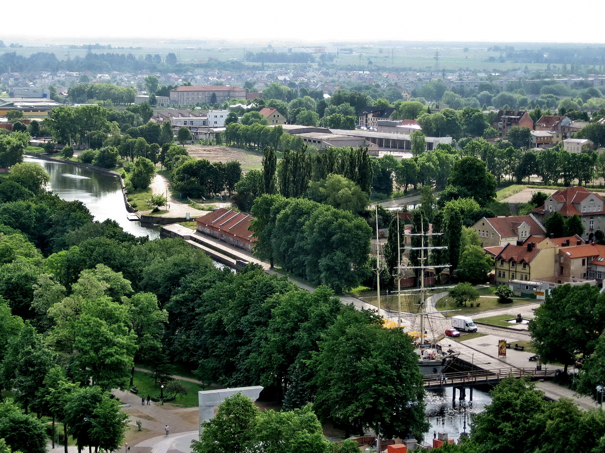 Meridianas Akmenos - Dangės upėje